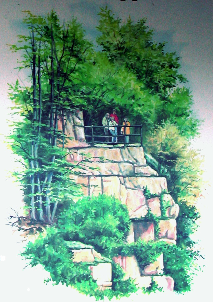 Darstellung der Hannoverschen Klippen auf einer dort angebrachten Schautafel